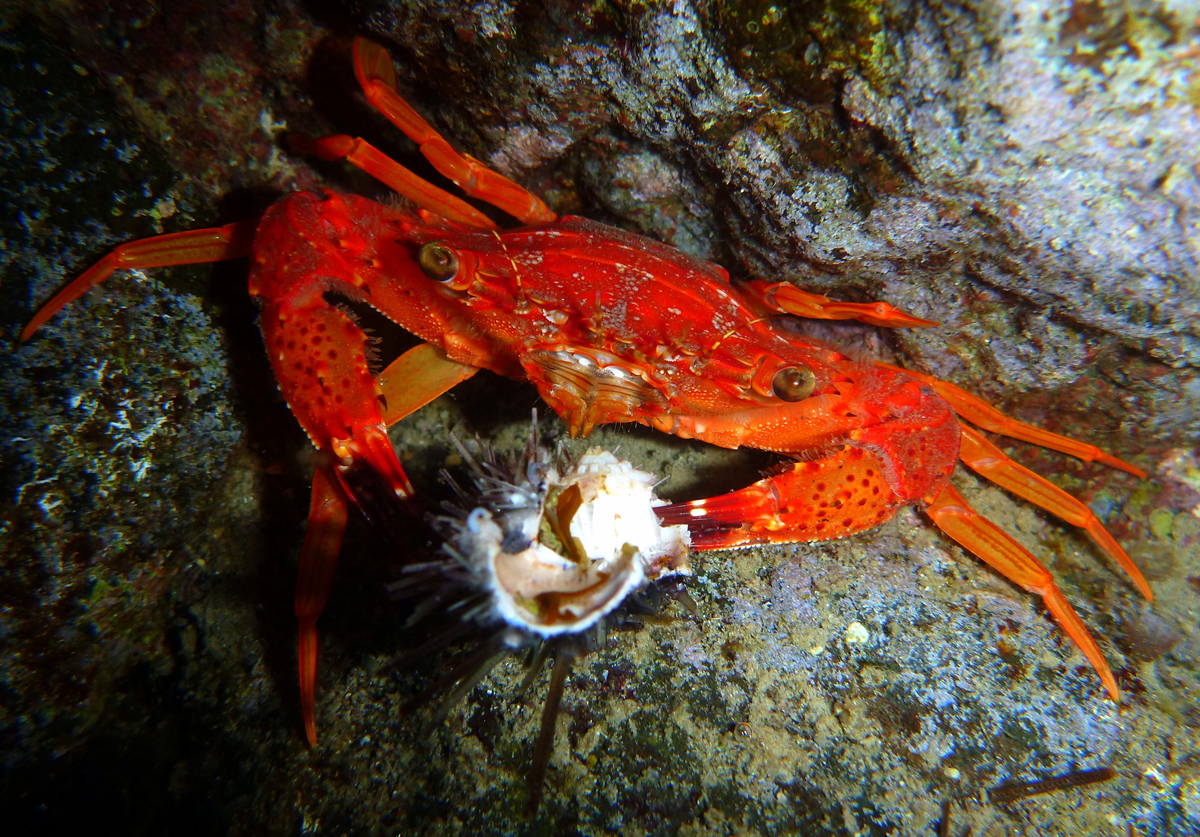 Un crabe Gonioinfradens paucidentatus dégustant un oursin à la Réunion.